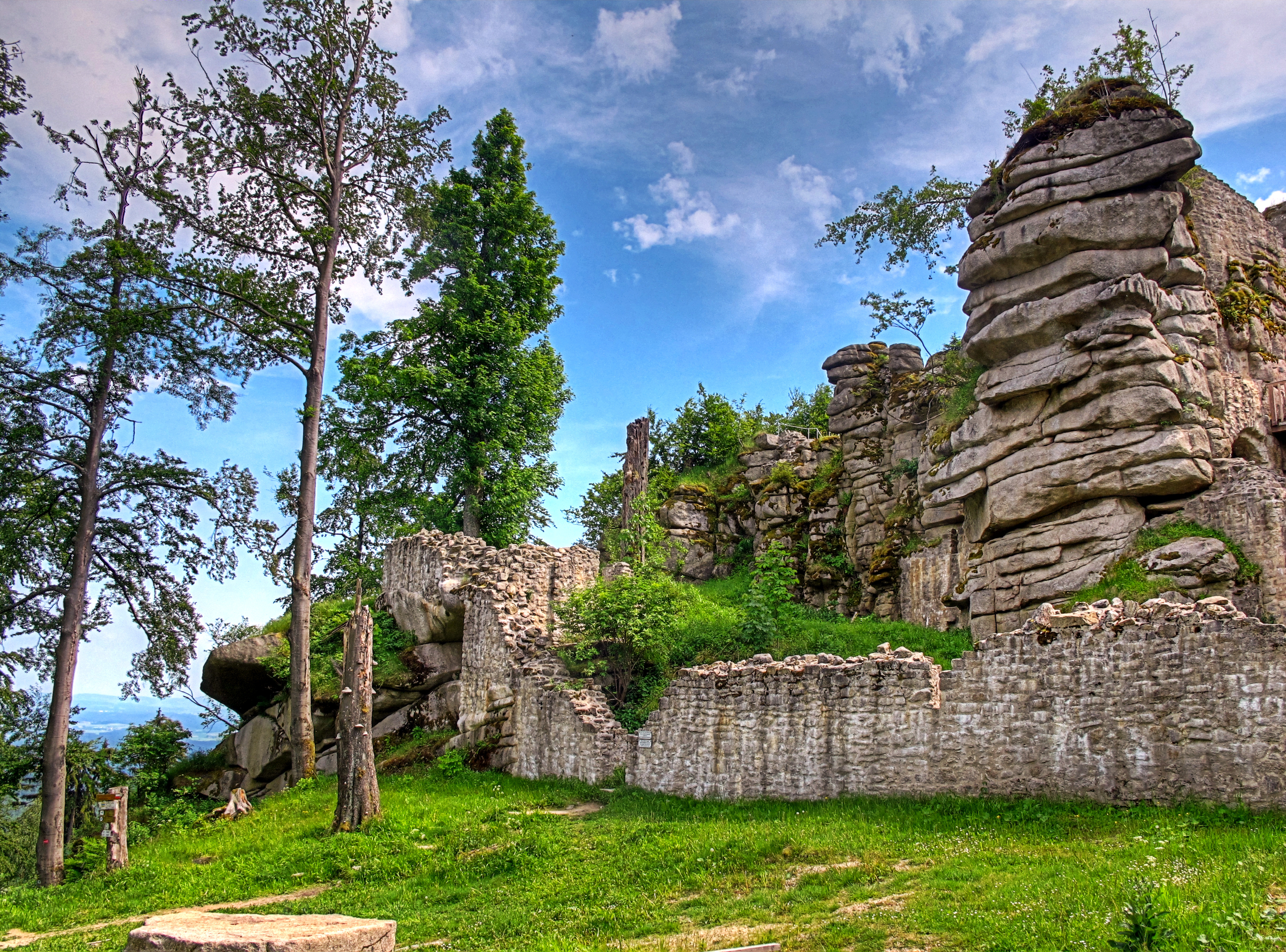 Deutschland, Bayern, Oberpfalz, Landkreis Tirschenreuth, Burgruine Weißenstein im Steinwald (Fichtelgebirge)